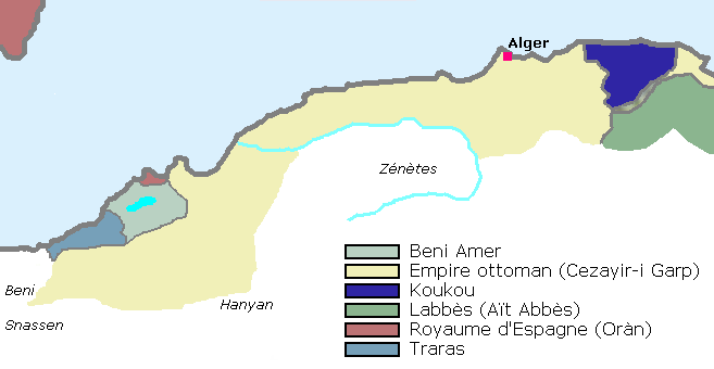 Souverainetés et peuples au nord du Maghreb central, en 1600. D'après Euratlas [1]